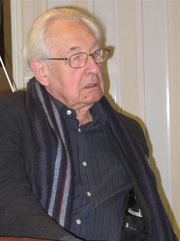 Andrzej Wajda (1926-2016), Polish film director